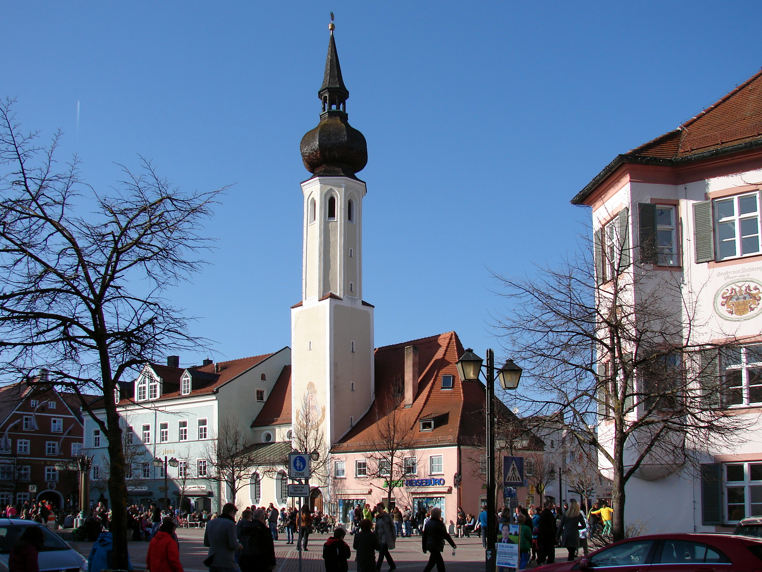 Ehemalige Frauenkirche, ursprünglich dreischiffige Basilika mit Zwiebelturm, Ende 14. Jahrhundert, 1666 erneuert und seit 1802 profanisiert.